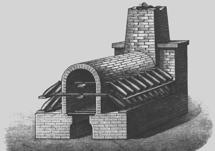 Galeerenofen zur Schwefelsäureproduktion, um 1870